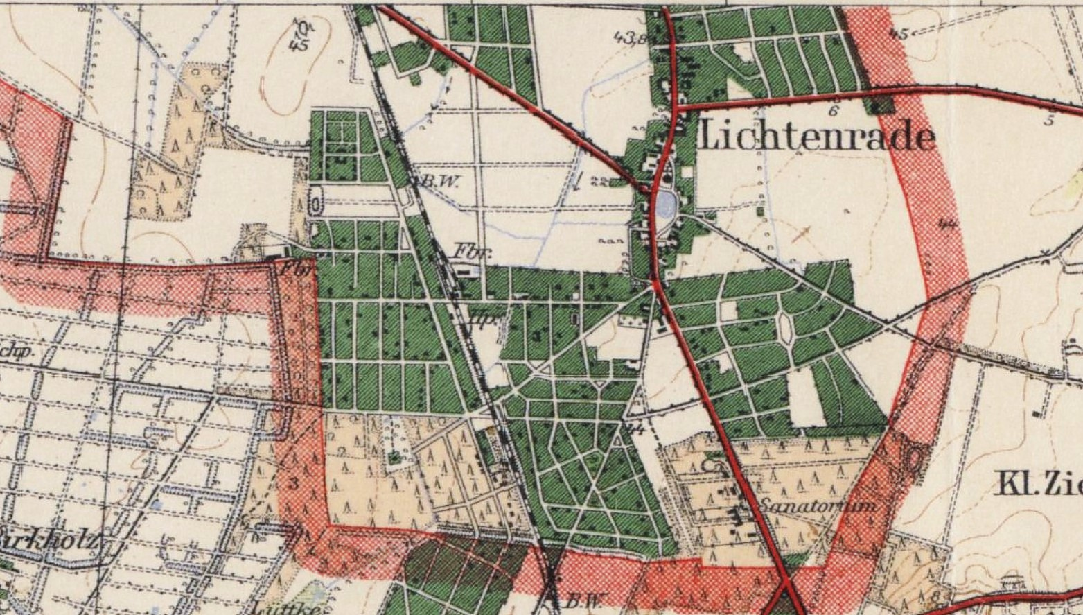 Situation der Straßenzüge in Berlin-Lichtenrade nach der Landesaufnahme bis 1920